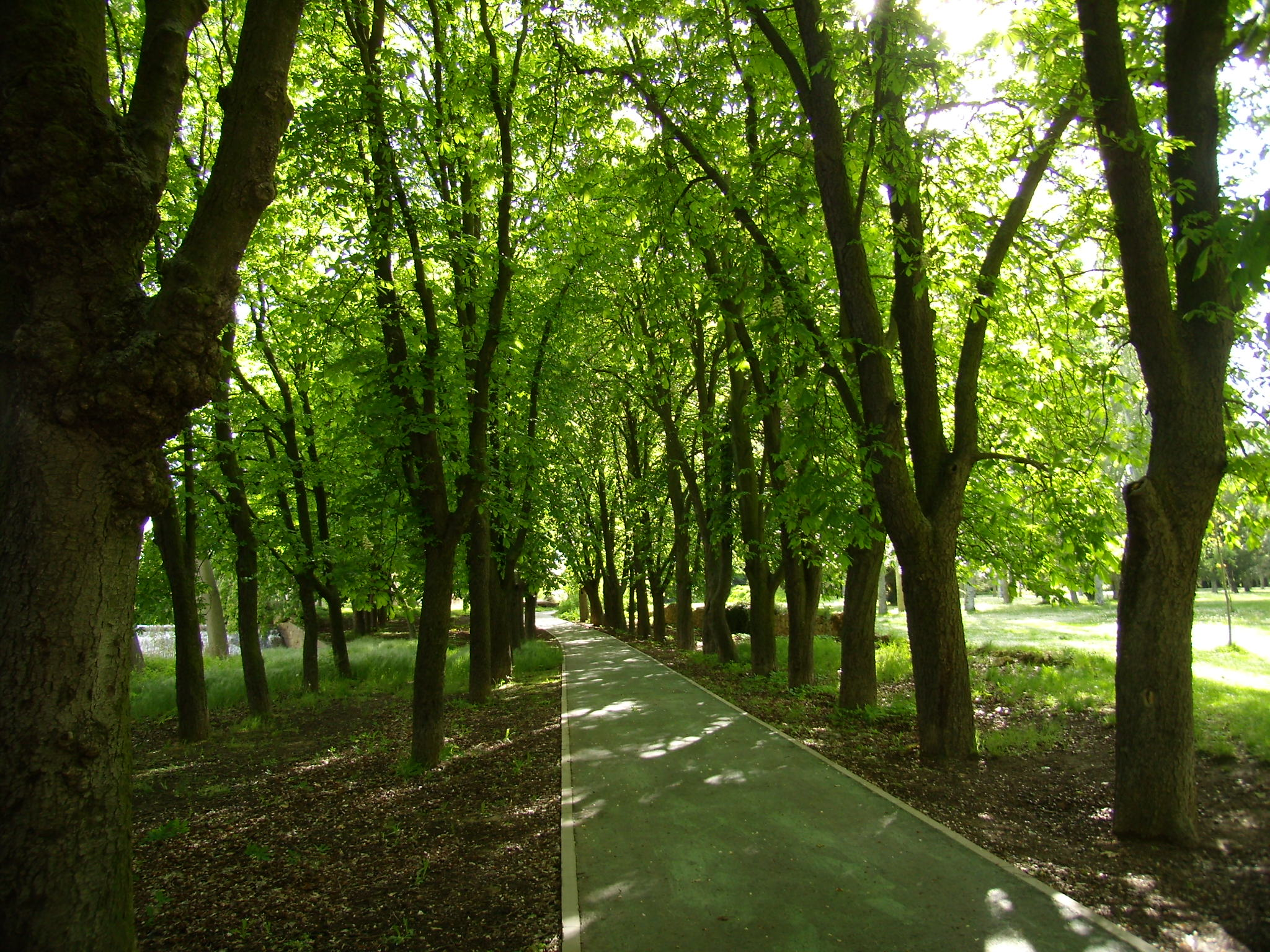 Paseo de los Canónigos, en Palencia